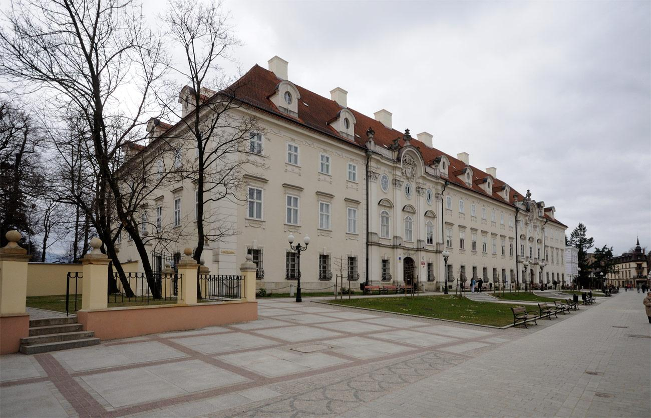 Pałac Schaffgotschów - obecnie siedziba oddziału Politechniki Wrocławskiej w Jeleniej Górze.